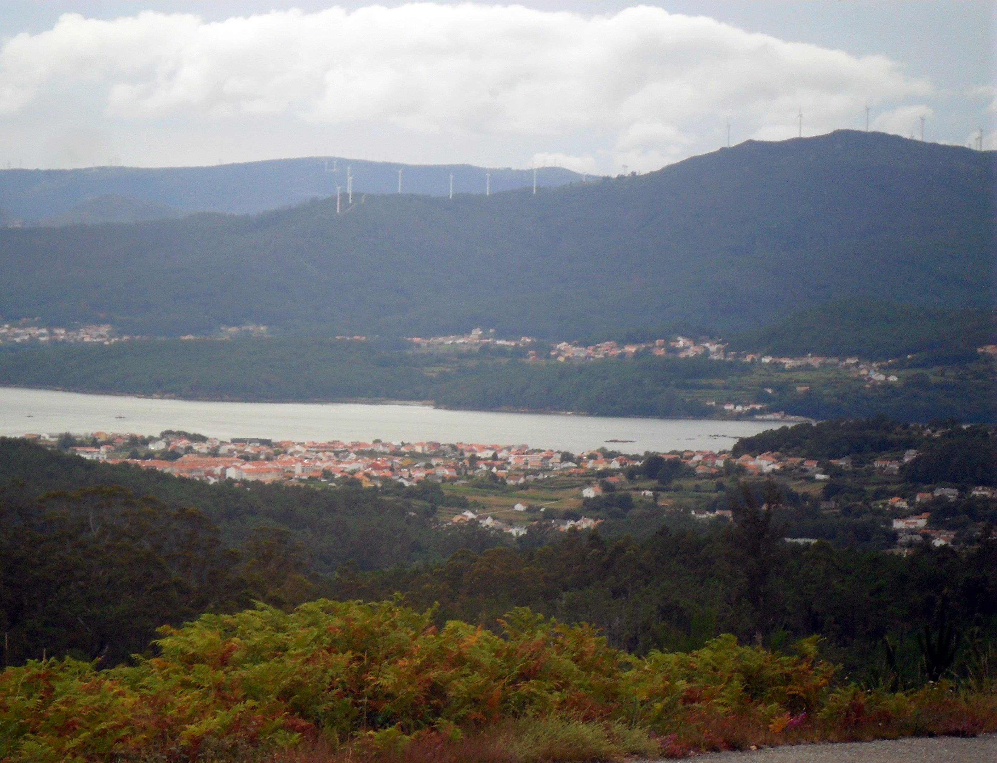 Monte Tremuzo desde el otreo lado de la Ría de Muros y Noya